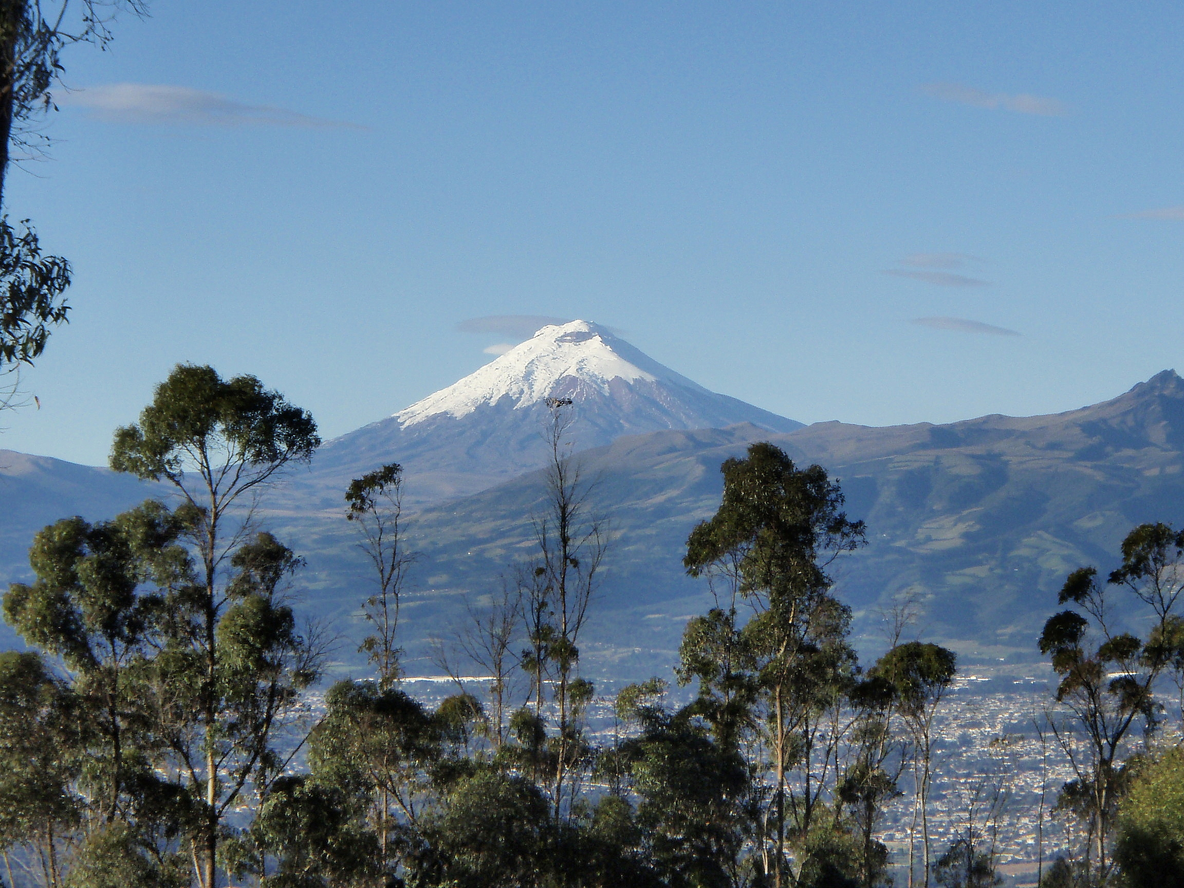 Volcán Cotopaxi visto desde Quito